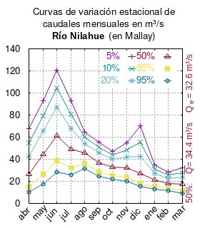 Curvas de variación estacional del río Nilahue en Mallay. # Dirección General de Aguas # Diagnóstico y clasificación de los cursos y cuerpos de agua según objetivos de calidad. Cuenca del río Bueno. # Santiago de Chile # Ministerio de Obras Públicas (Chile) # 2004 # url: # urlarchivo: # Tabla 4.2: Río Nilahue en Mallay (m3/s), pág. 45 mes 5% 10% 20% 50% 85% 95% abr 67.60 54.95 42.75 26.47 14.66 10.36 may 92.62 79.37 65.55 44.68 26.14 17.73 jun 120.61 104.24 87.17 61.40 38.50 28.11 jul 93.21 80.83 68.01 48.89 32.56 25.65 ago 64.79 59.92 54.51 45.49 36.40 31.93 sep 55.53 50.75 45.52 36.96 28.60 24.61 oct 47.23 43.78 39.78 32.82 25.45 21.70 nov 54.61 48.46 42.04 32.34 23.73 19.83 dic 70.42 55.45 42.29 27.05 18.12 15.46 ene 34.76 31.09 27.17 20.99 15.28 12.68 feb 28.19 25.54 22.66 18.03 13.60 11.53 mar 31.97 27.86 23.59 17.16 11.60 9.21 This plot was created with Gnuplot.